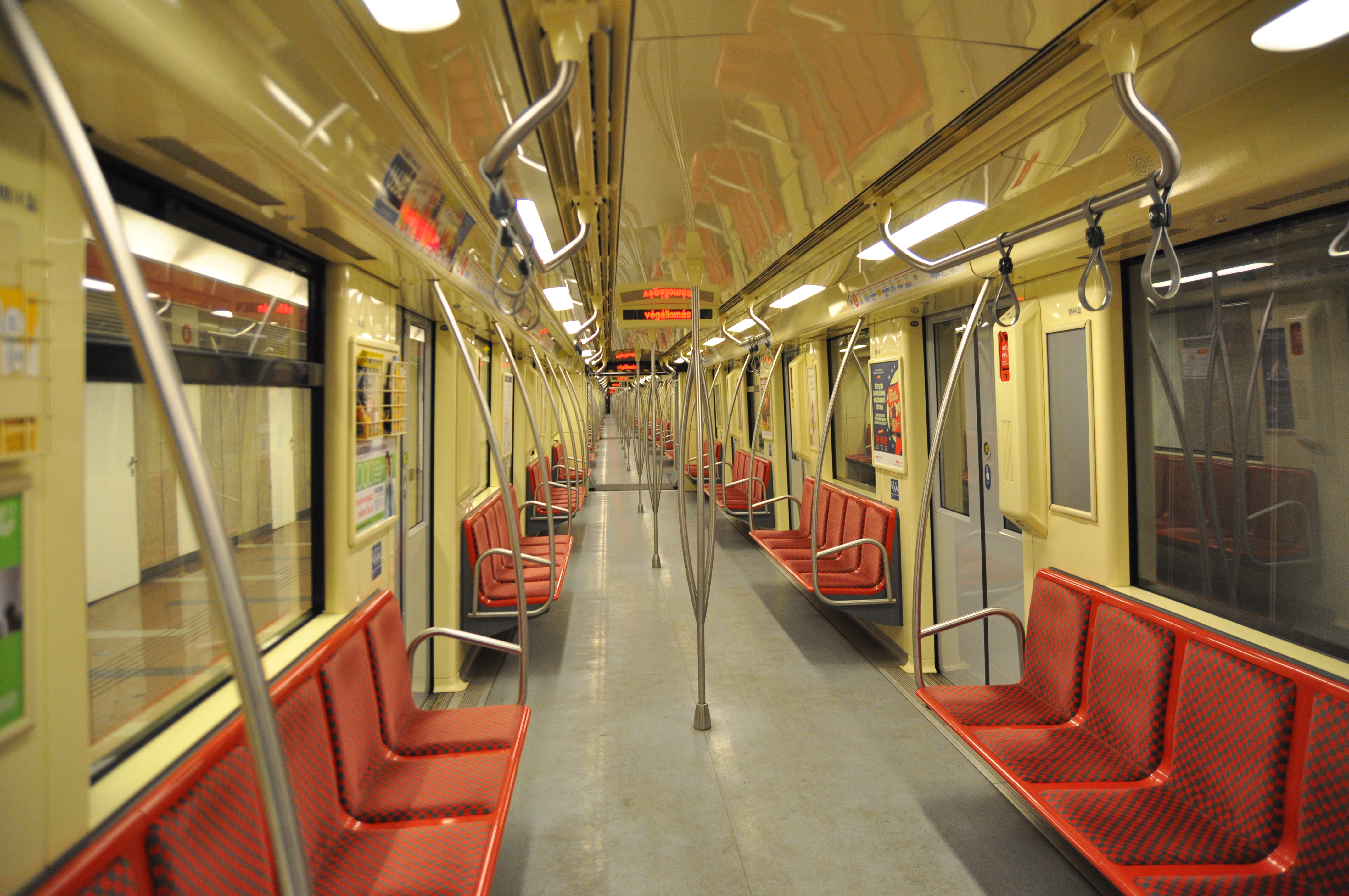 Budapest, metró 2, Alstom Metropolis AM5-M2